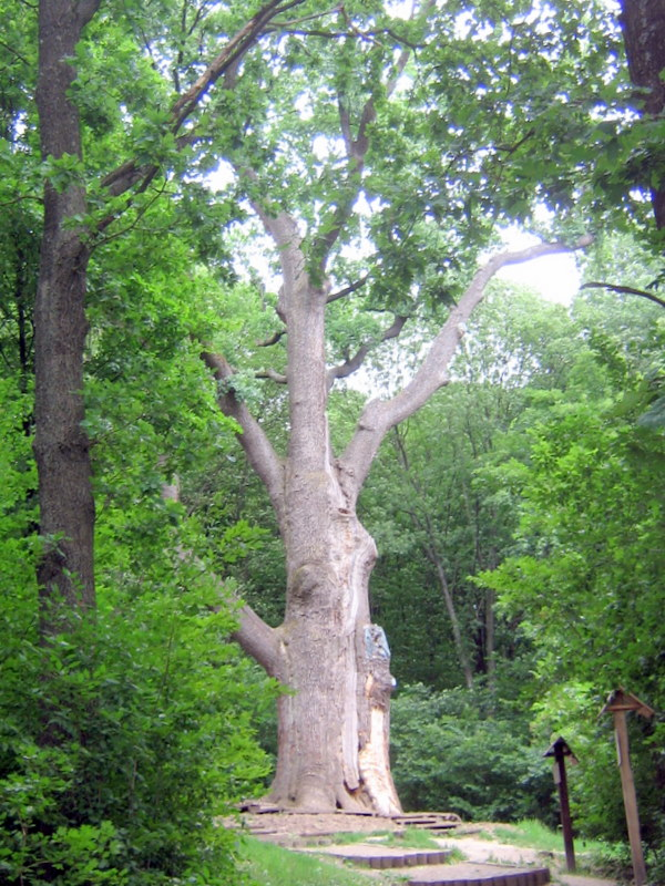 Дуб Максима Железняка.